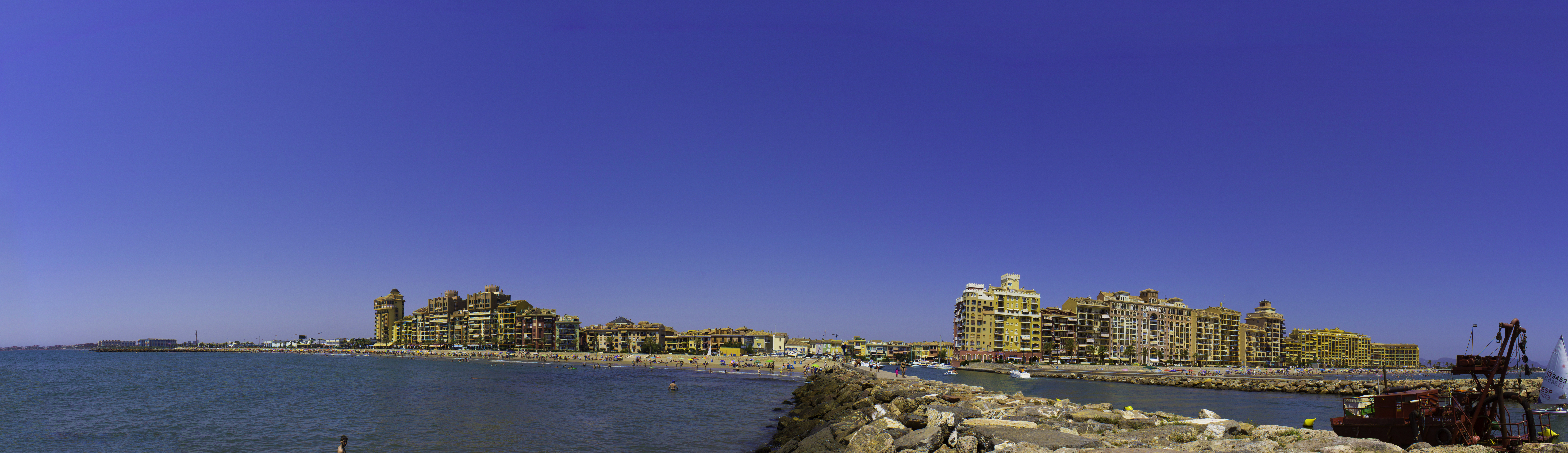 Panorama de La Urbanización Saplaya